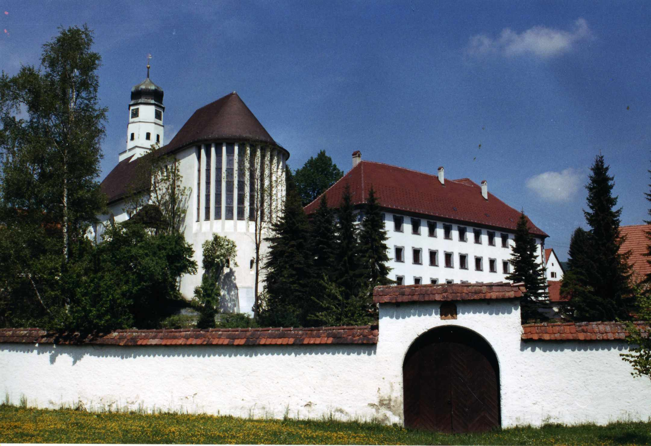 Kloster Margrethausen, Albstadt Quelle: Stadtarchiv Albstadt